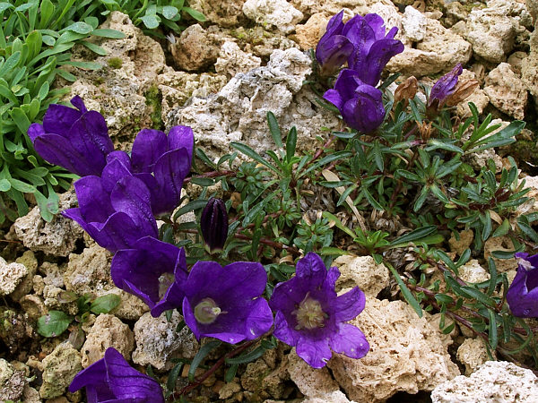 Syn. Wahlenbergia serpyllifolius. Plante prostrée de 2 à 5 cm de l'ouest de la Yougoslavie et du nord de l'Albanie, pousse sur les éboulis en montagne. (photo en culture)